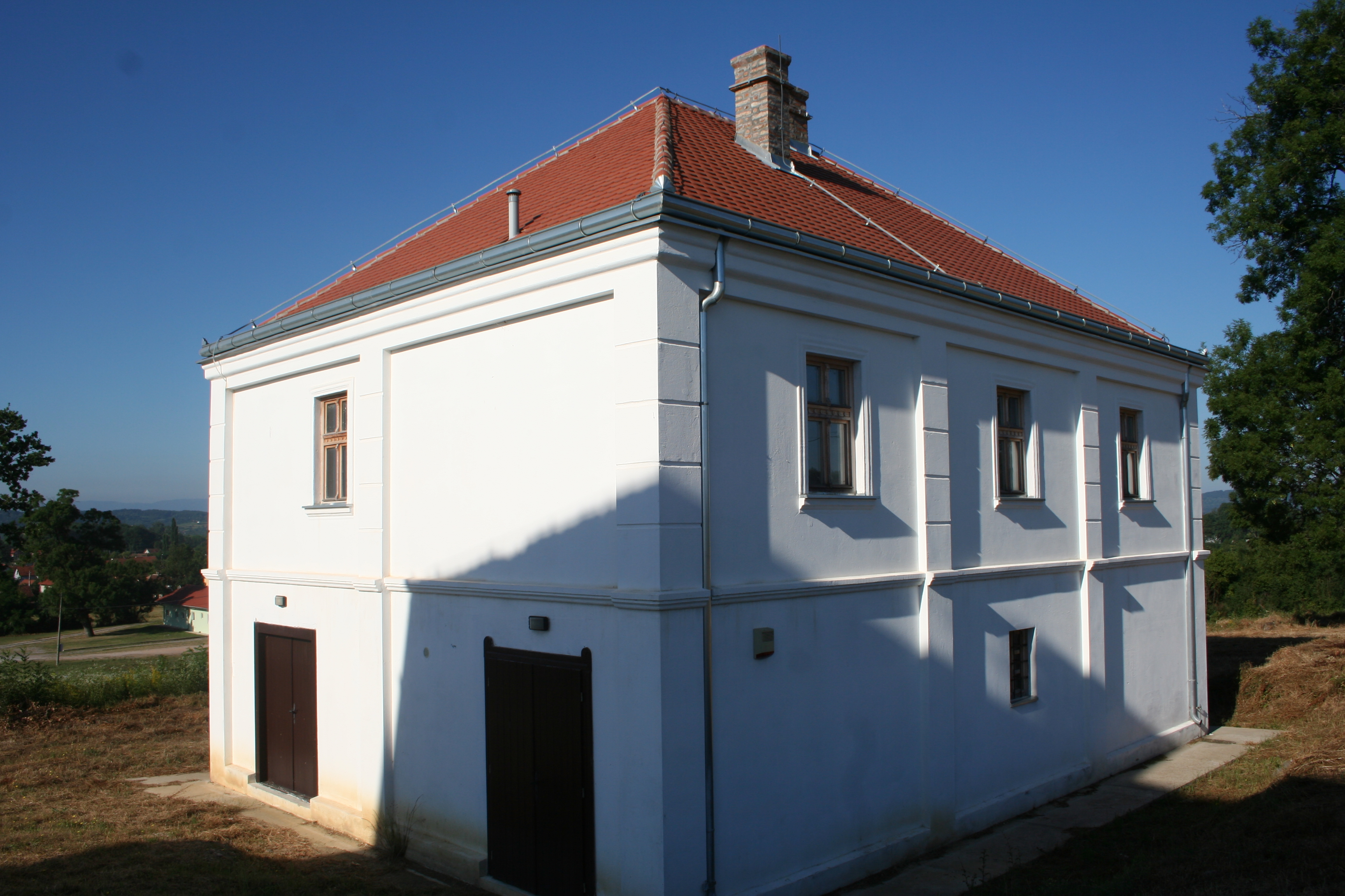 Konaci Radića i Brene Mihajlović (preseljeni iz Malog Borka u Lajkovac)